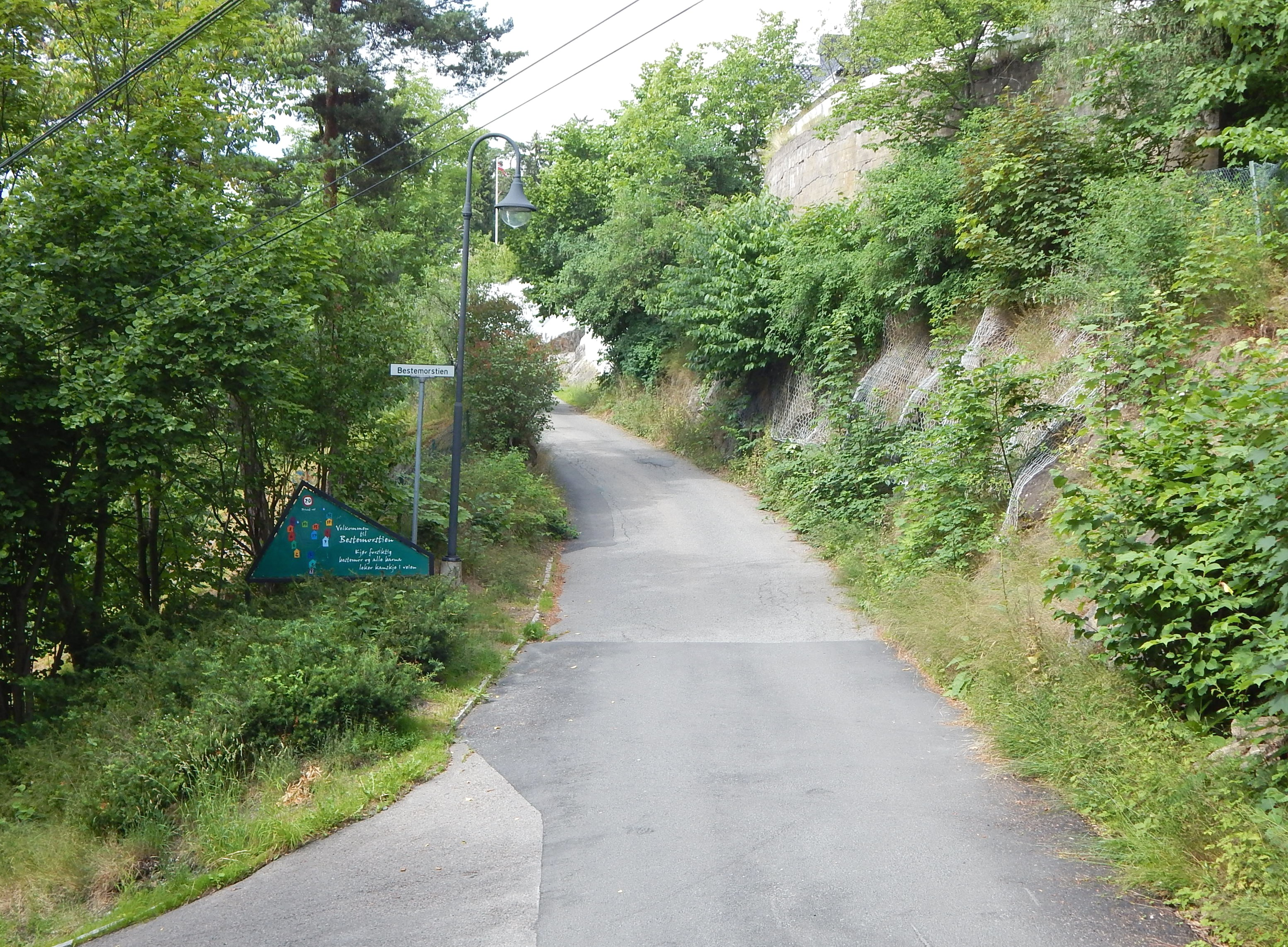 Bestemorstien sett fra Brattbakken